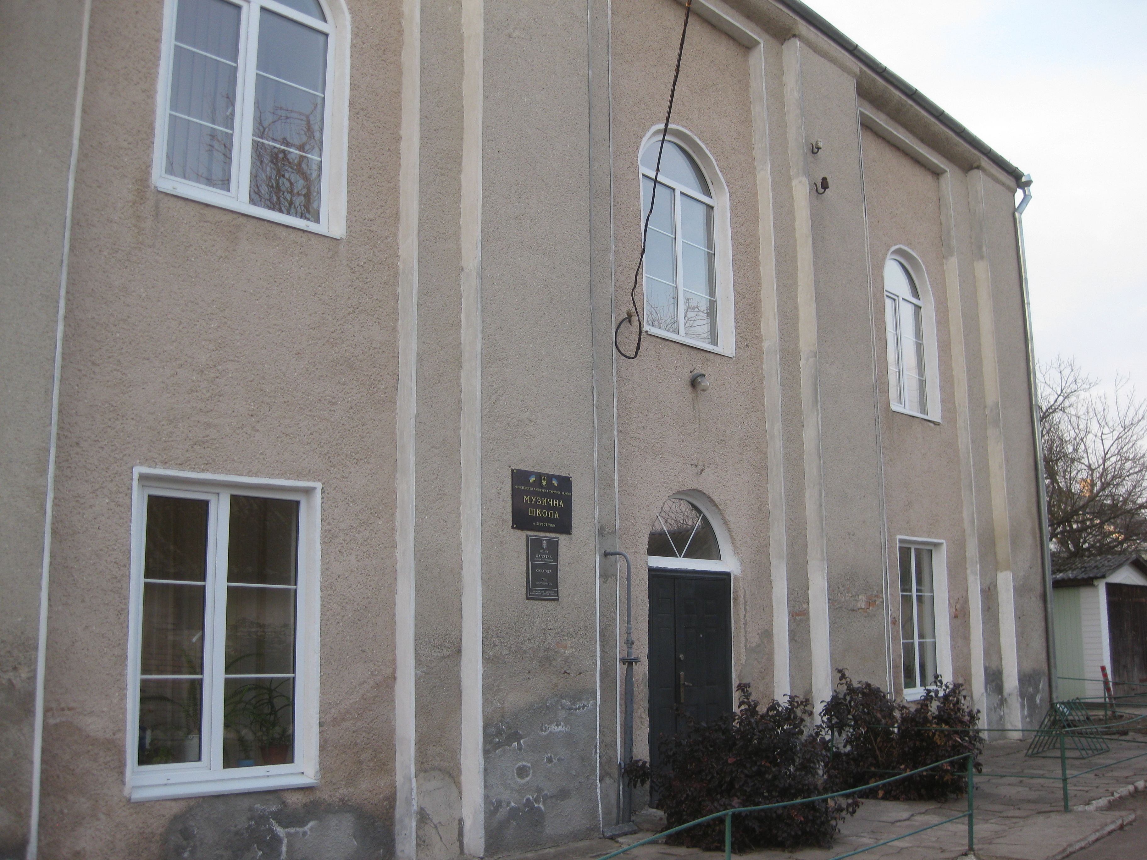 Синагога (мур.), Берестечко